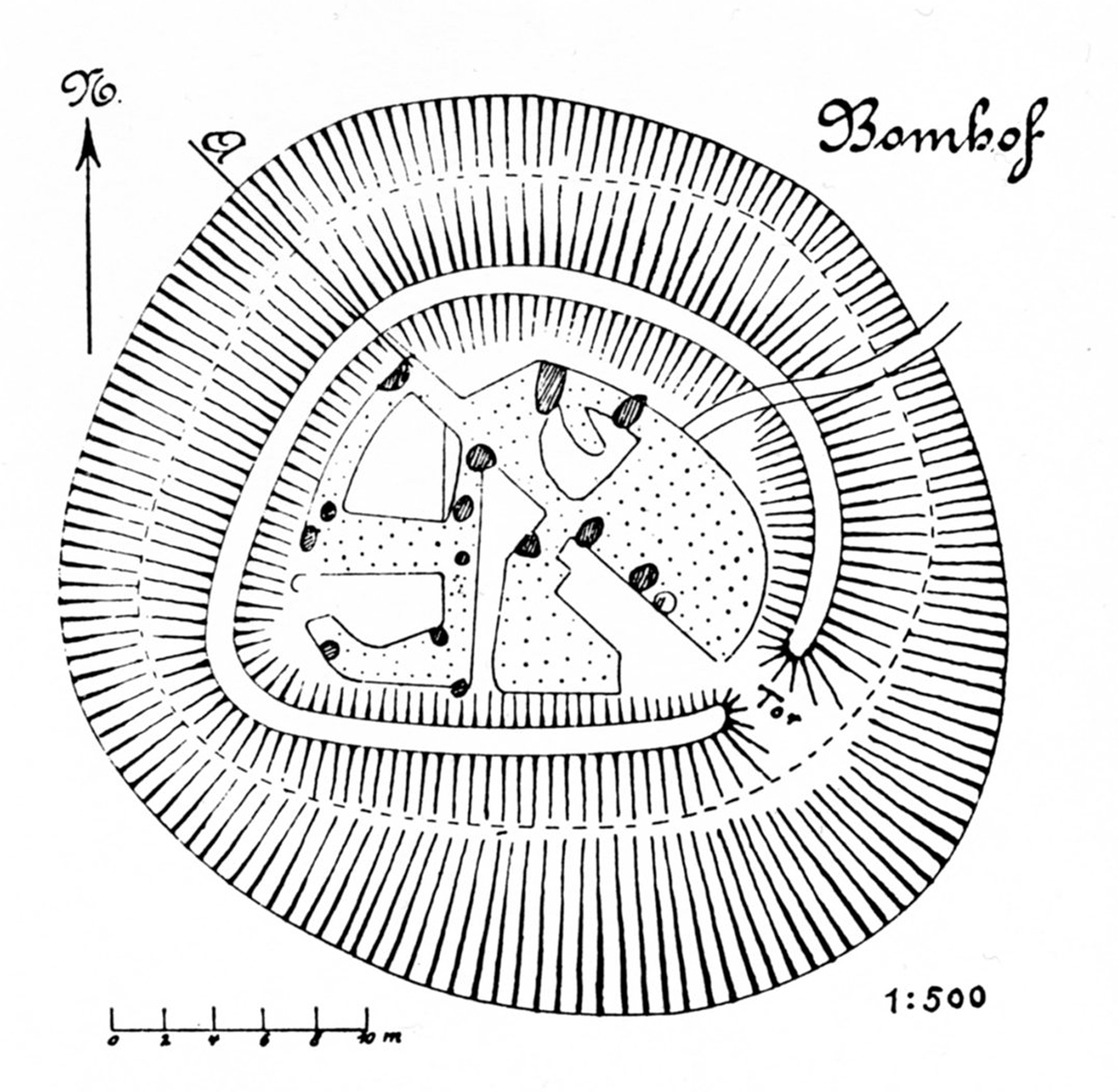 Der Bomhof bei Lüdge, Lageplan mit Grabungsflächen von 1916 (nach Carl Schuchhardt 1859-1943).